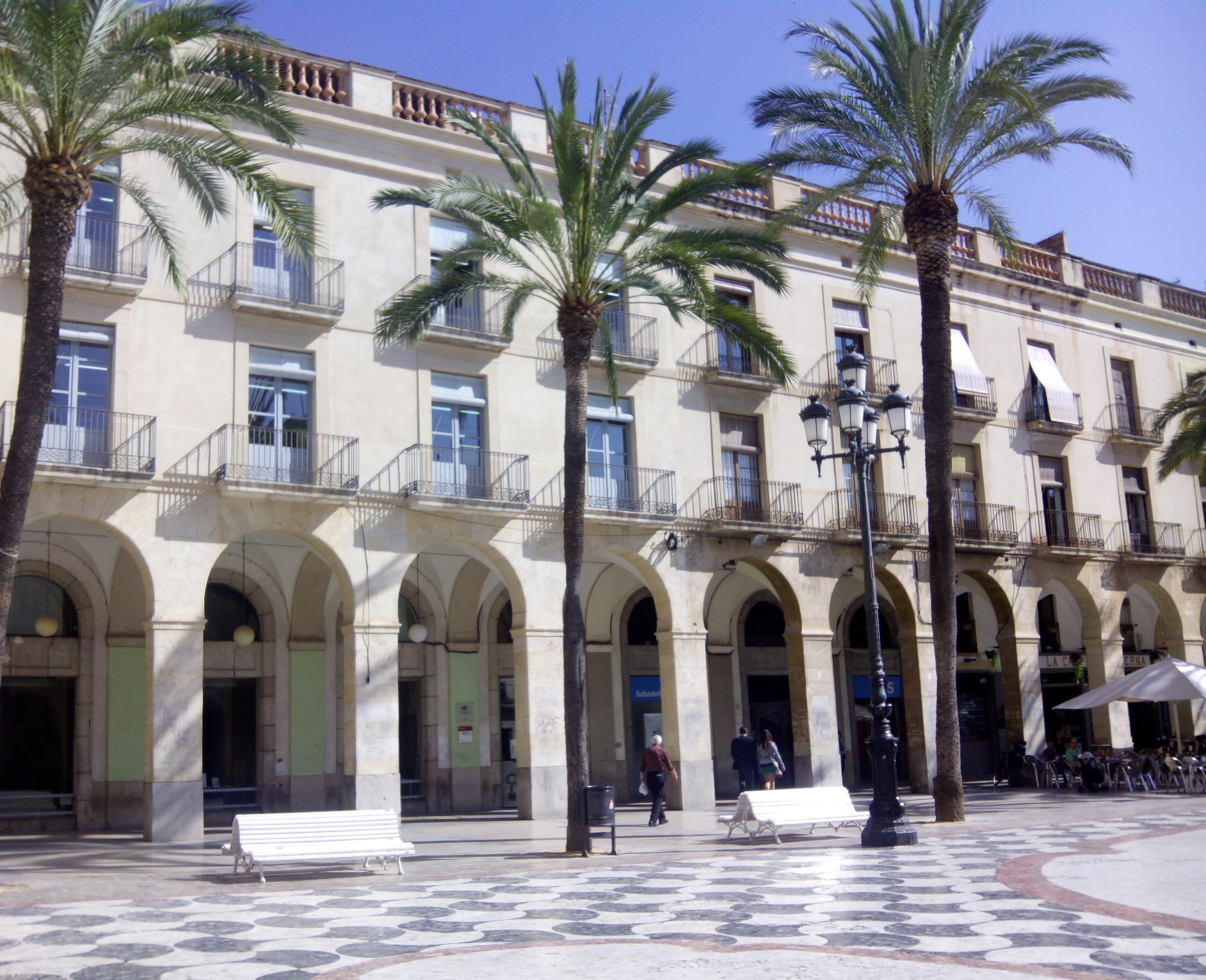 Fachada de la biblioteca Joan Oliva i Milà en Vilanova i la Geltrú